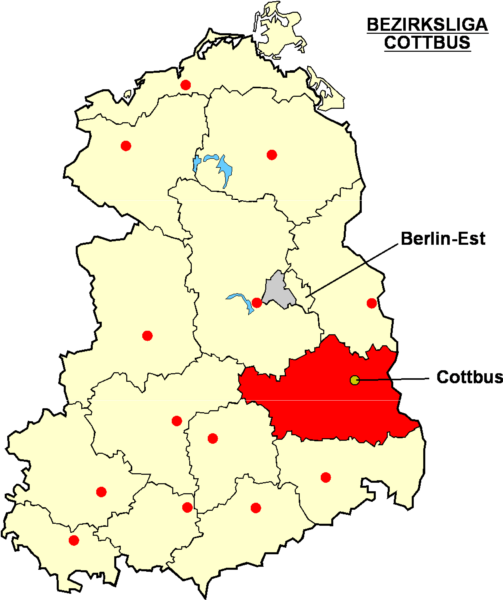 Localisation de Cottbus dans la "Bezirksliga Cottbus" Catégorie:Logo de clubs de football - Allemagne